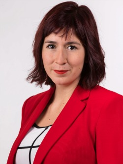 Catalina Pérez Salinas en la fotografía oficial de diputados periodo 2018-2022. (Fotos: Christel Andler, René Lescornez, Johanna Zárate)